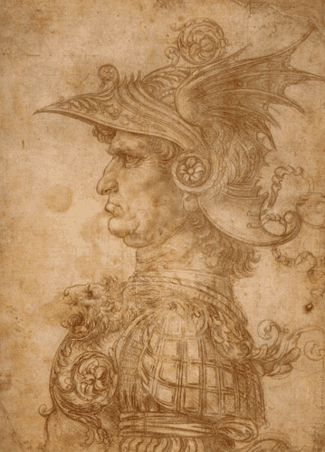 sujet : Croquis de Léonard de Vinci.